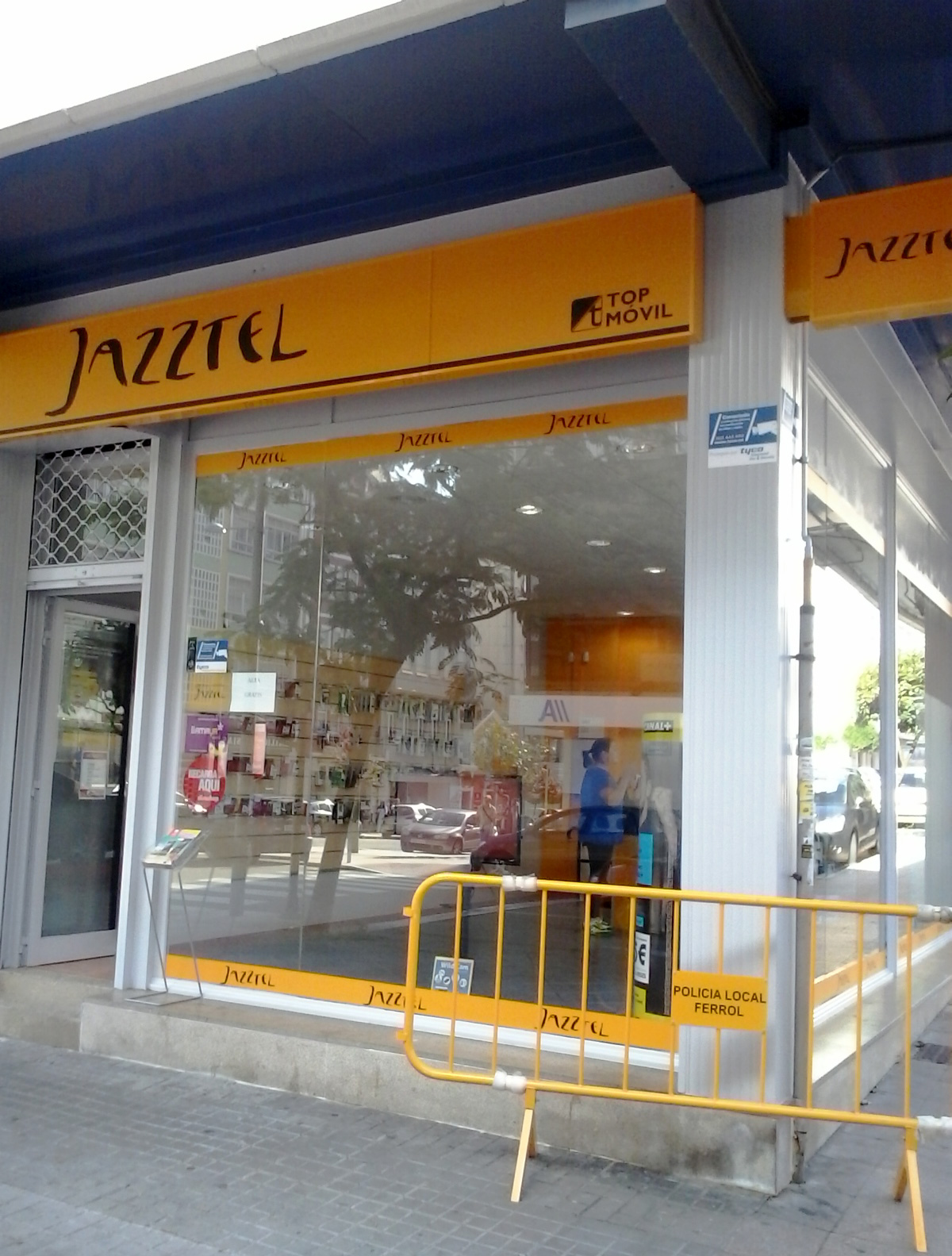 Tenda de Jazztel en Ferrol, A Coruña Galiza